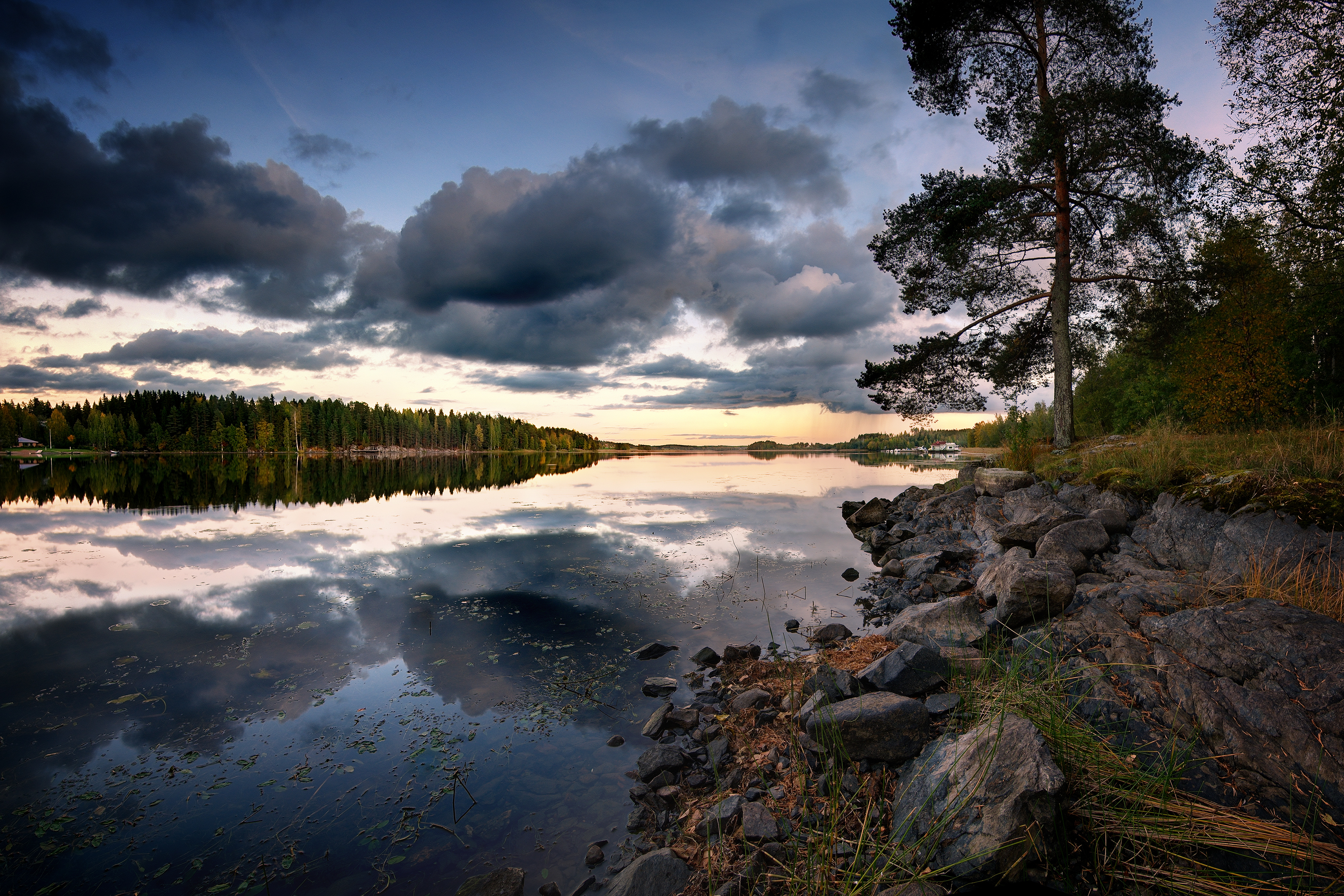 Siilinjärvi, Northern Savonia, Finland Tokina 11-16 2.8, Nikon D200, -3 ... +1 -haarukointi, enfuse, hugin. Projektiona Panini, kompressio jotain ~70 luokkaa.